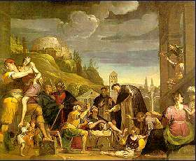 Affresco del "Miracolo di San Pietro Martire" di Giovanni Paolo Ghianda, conservato presso la "Pinacoteca di palazzo Volpi" in Como